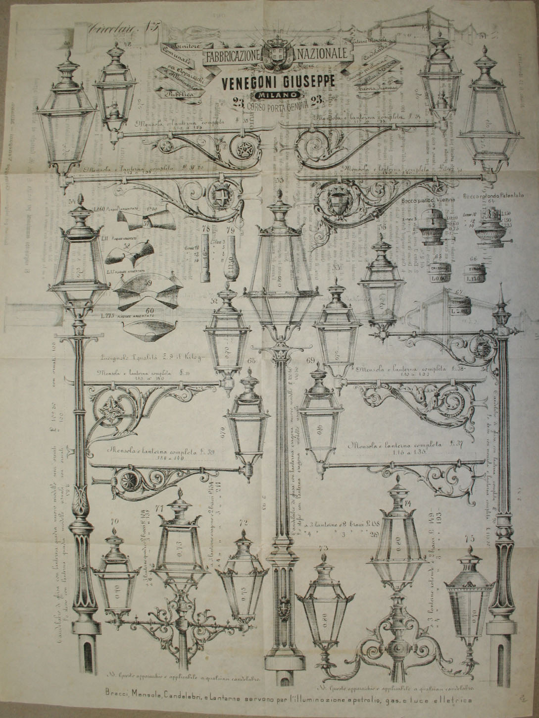 Pieghevole illustrante articoli per l'illuminazione a petrolio, a gas e a luce elettrica, 1883 (AS Enna, Archivio Storico di Castrogiovanni, b. 57, c. 250)